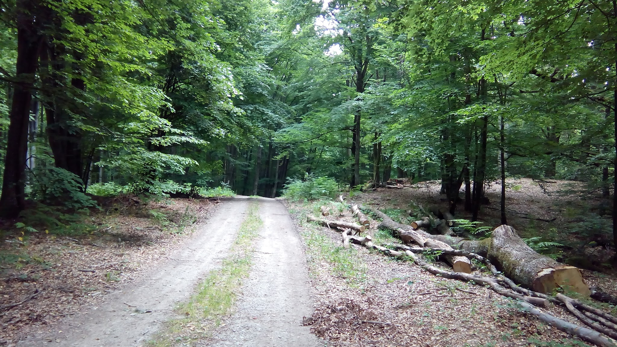 43500, Donji Borki, Croatia